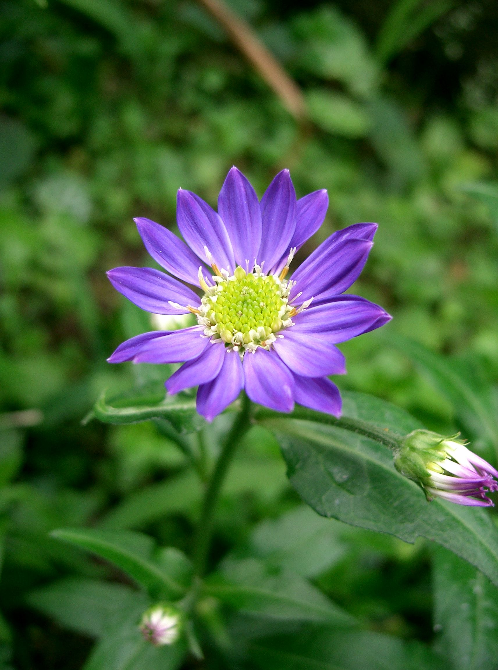 Gymnaster savatieri (Scientific name), Place:Osaka-fu JAPAN